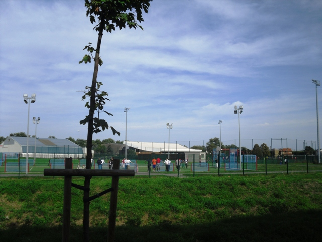 Le stade Georges Brassens de Vigneux-sur-Seine (91)